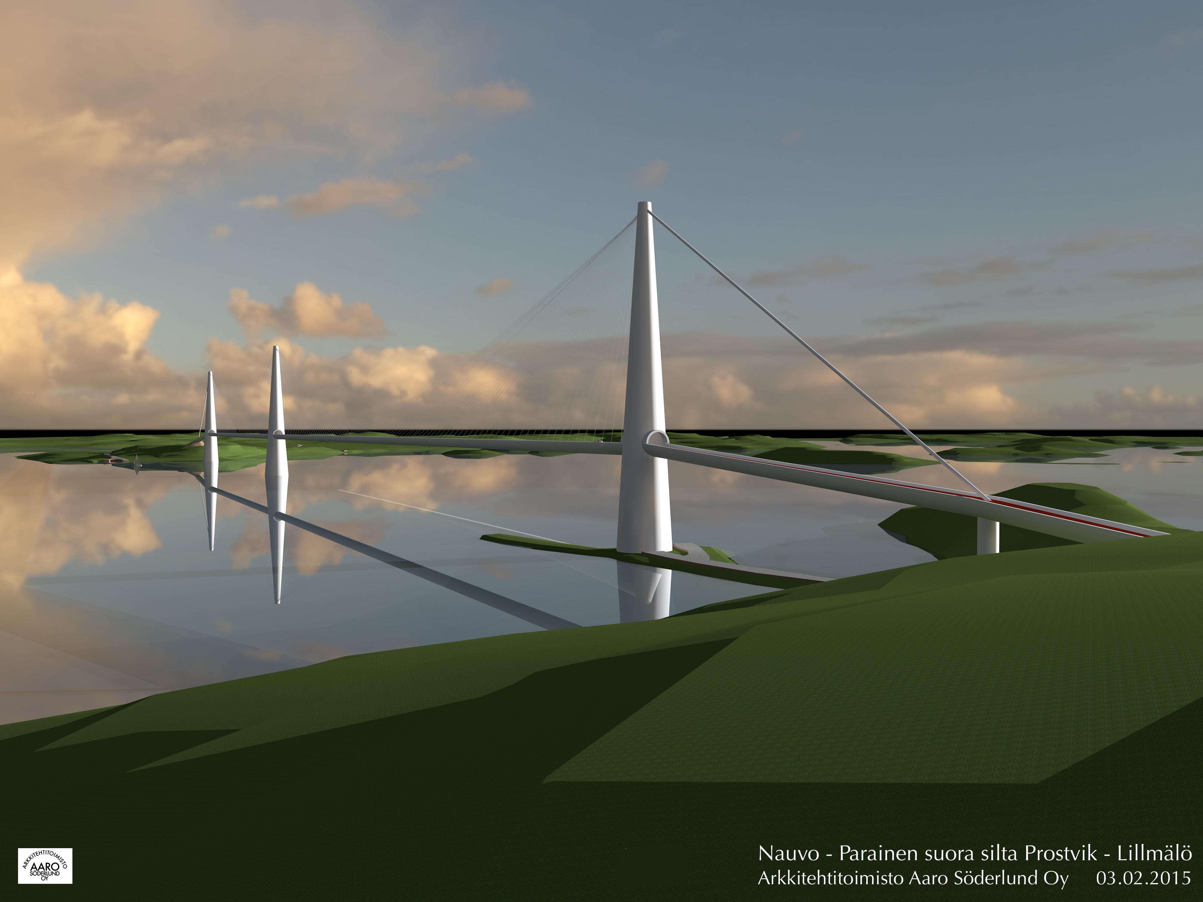 Kolmipyloninen epäsymmetrinen vinoköysisilta (pituus 1600 m) nykyiselle Nauvo-Parainen maantielauttavälille sijoitettuna (konsepti); Näkymä Nauvon Prostvikin Kalvinkalliolta kohti Paraista.